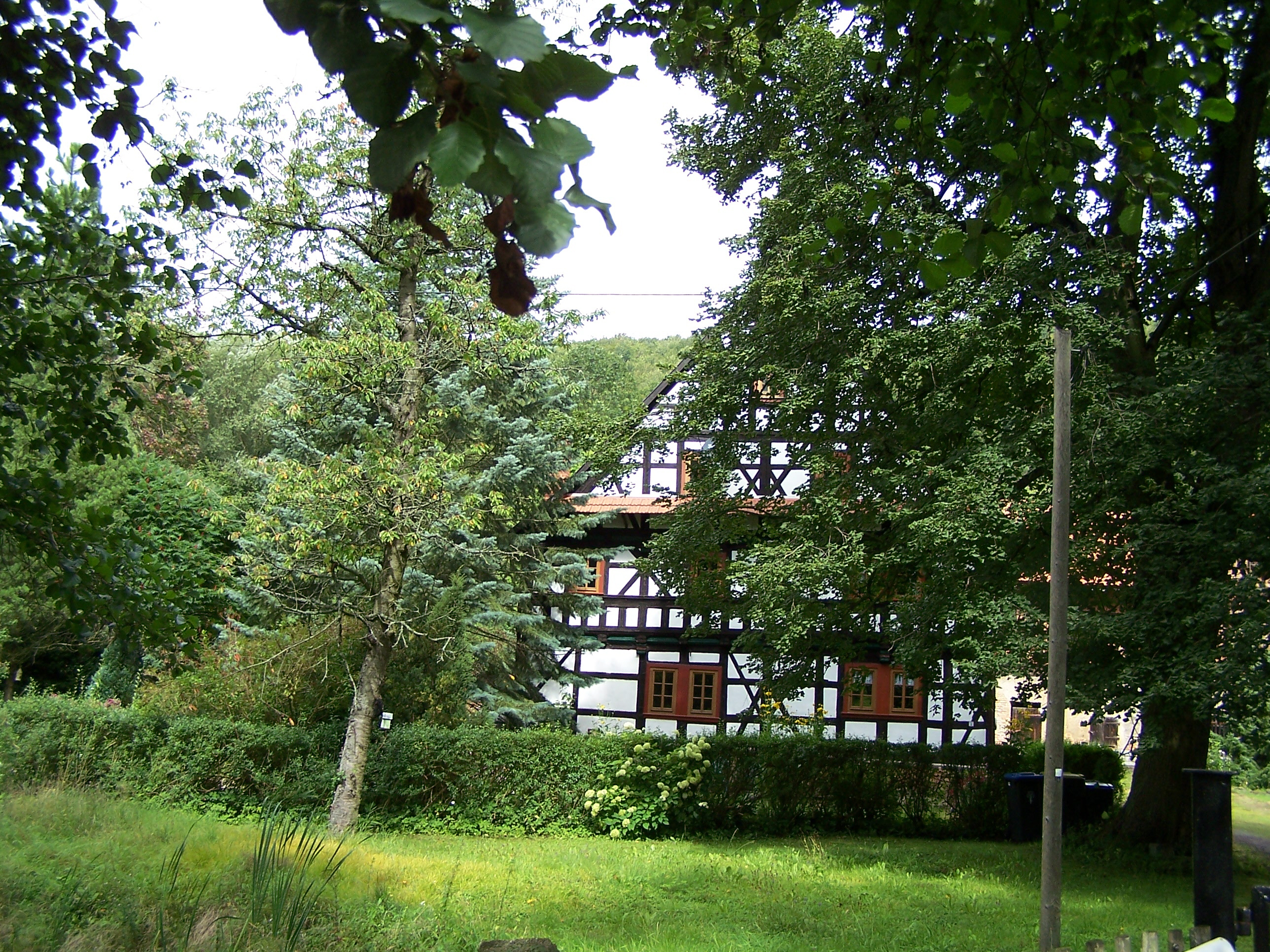 Der denkmalgeschützte Herrenhof in Burbach.